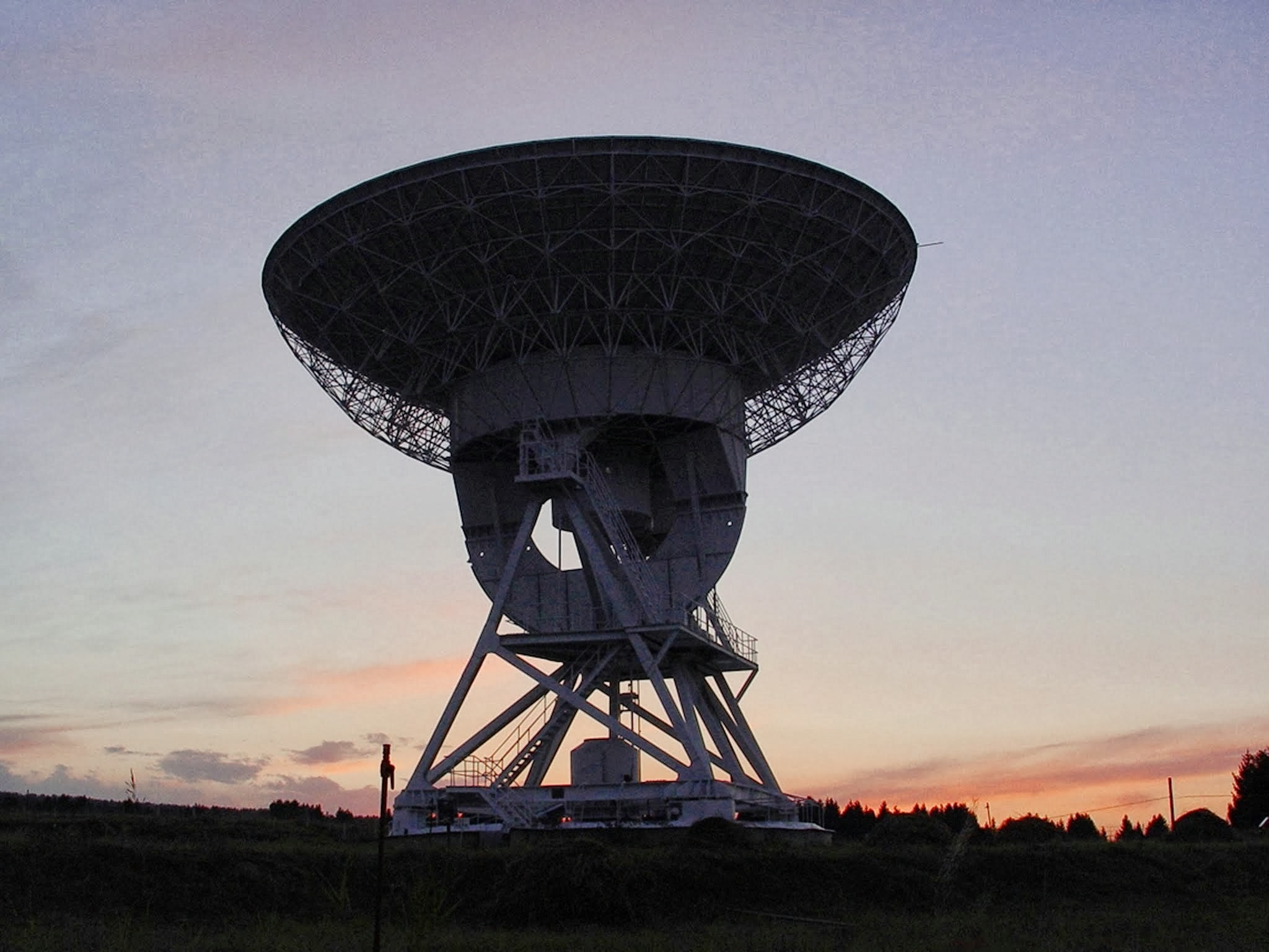 乌鲁木齐南山25米射电望远镜